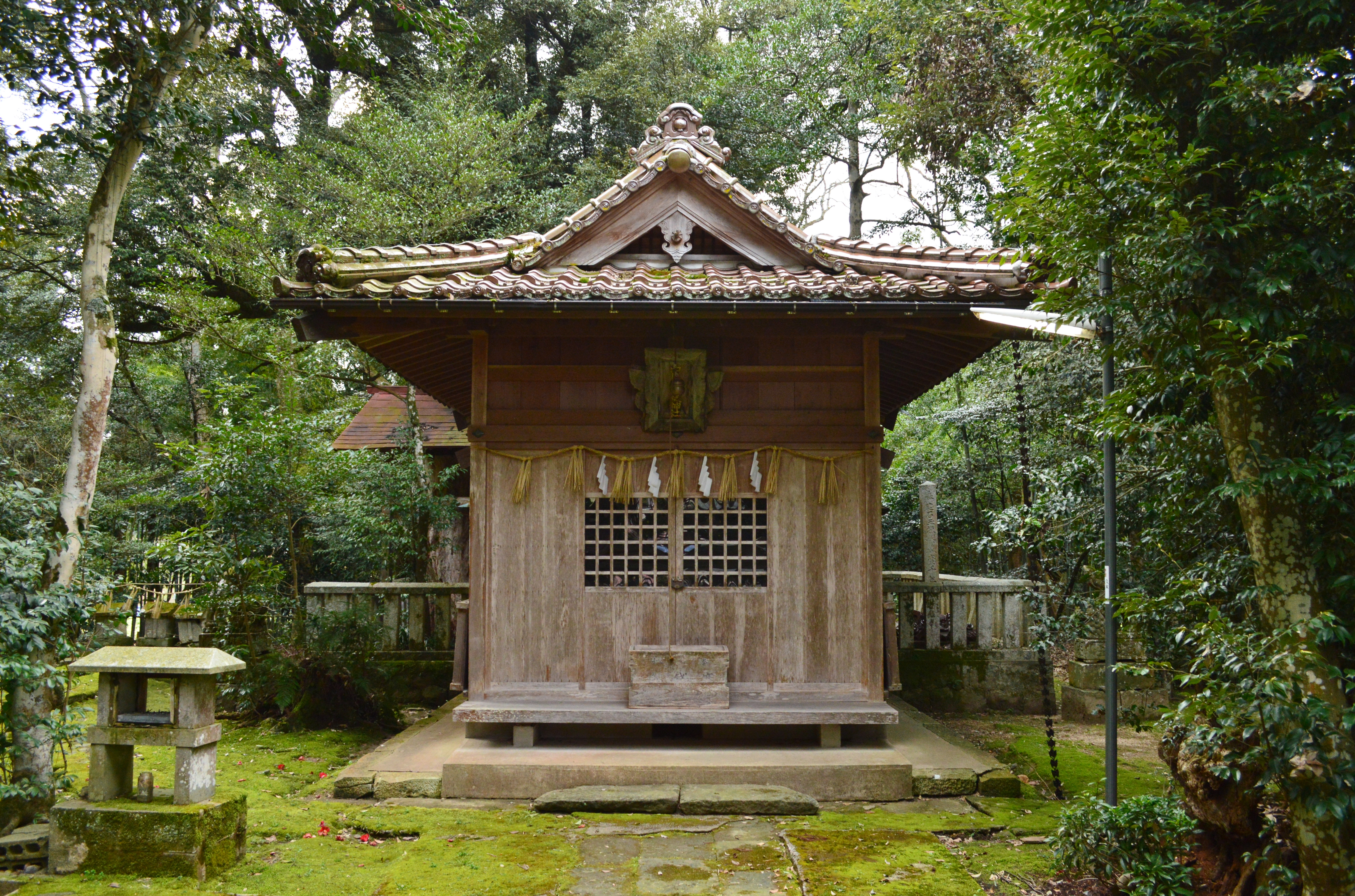 中臣崇健神社 拝殿 Nikon D3200